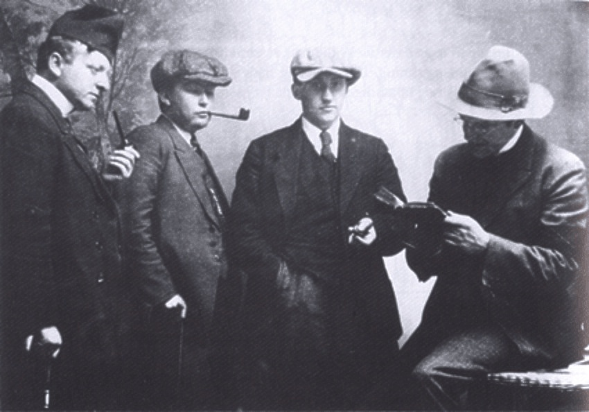 J.H.O. Djurhuus, Jørgen-Frantz Jacobsen, William Heinesen og Hans A. Djurhuus, fire af Færøernes største digter og forfatter. Sammentidig er det to generationer på billedet. Djurhuus brødrene til venstre og højre, og Jacobsen og Heinesen i midten. Føroyskt: J.H.O. Djurhuus, Jørgen-Frantz Jacobsen, William Heinesen og Hans A. Djurhuus, fyra av størstu yrkjarum og rithøvundum í Føroyum.